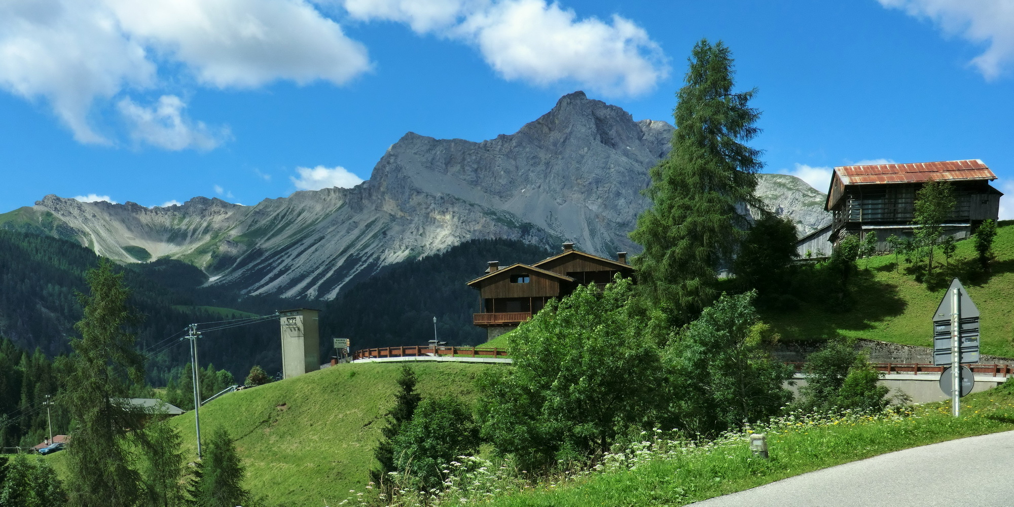 Sauris di Sopra, Sauris, Italy